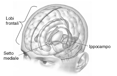 illustrazione con indicazione di setto mediano ed ippocampo.